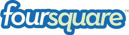 Foursquare logo